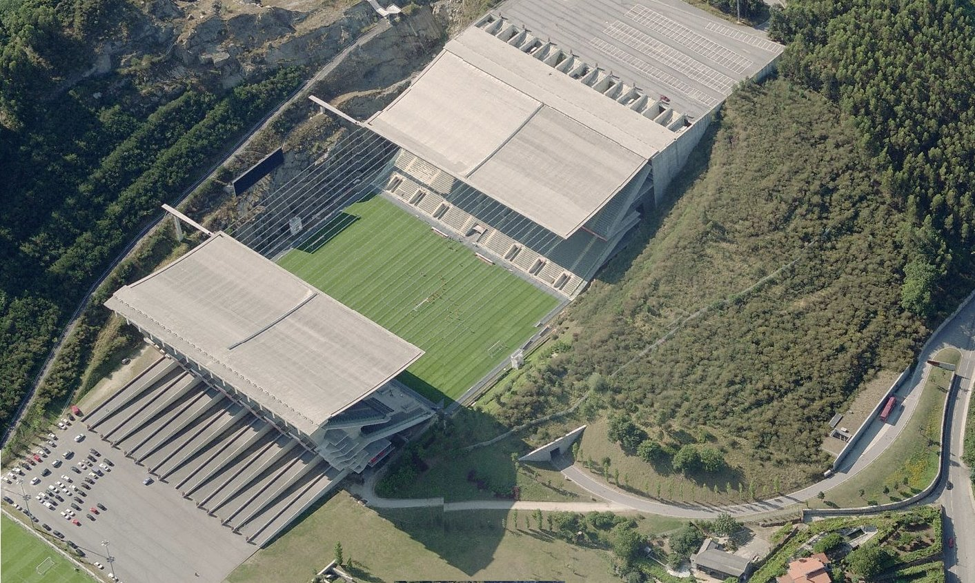 Eduardo Souto de Moura - Braga Stadium 03.jpg